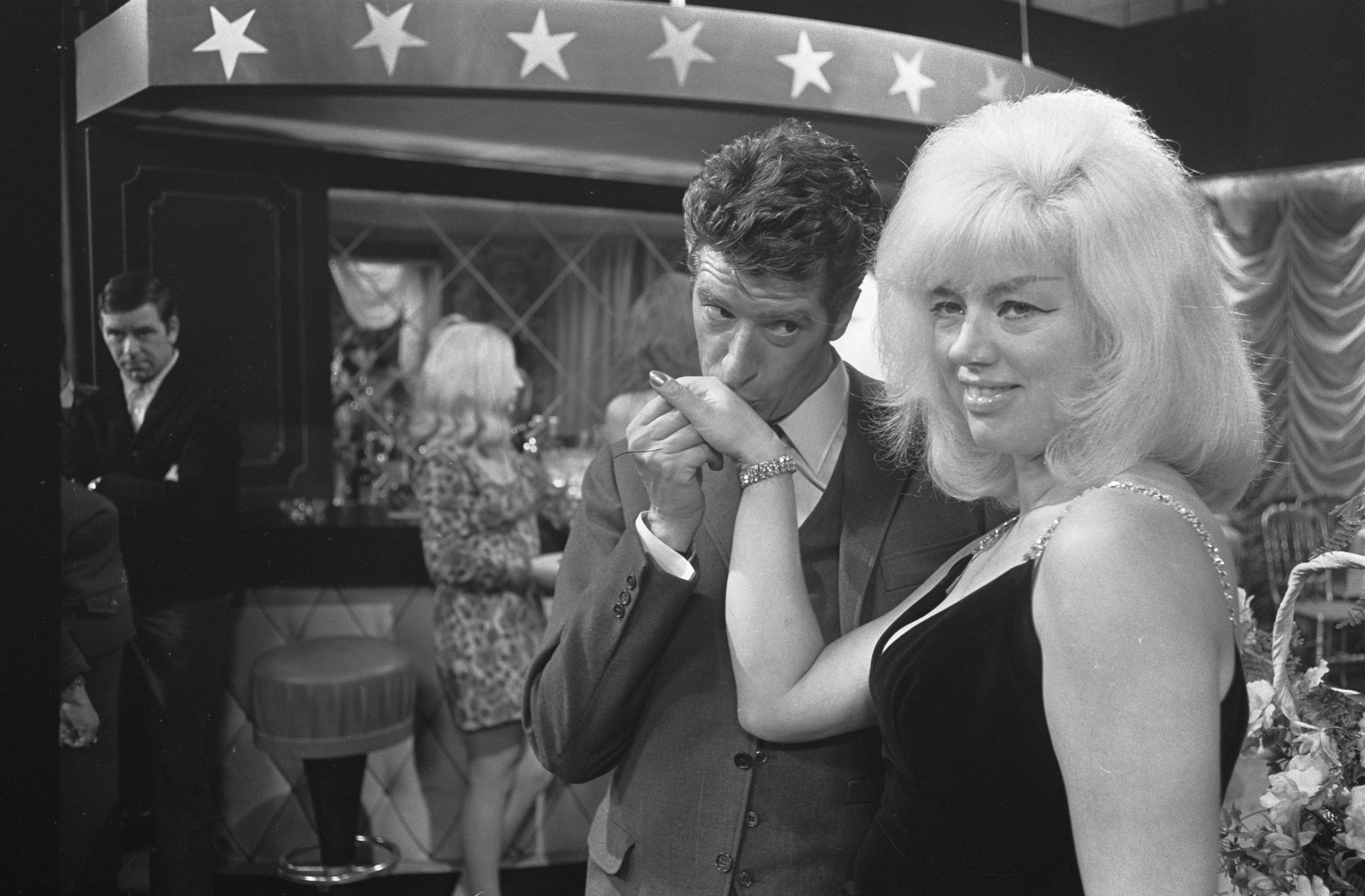 Collectie / Archief : Fotocollectie Anefo Reportage / Serie : Diana Dors in de Rudi Carrell show Beschrijving : Rudi Carrell en Diana Dors tijdens de repetitie van de show Annotatie : Diana Dors (1931-1984). Rudi Carrell (1934-2006) Datum : 19 oktober 1968 Locatie : Hilversum Trefwoorden : artiesten, televisieprogramma's Persoonsnaam : Carrell, Rudi, Dors, Diana Fotograaf : Fotograaf Onbekend / Anefo Auteursrechthebbende : Nationaal Archief Materiaalsoort : Negatief (zwart/wit) Nummer archiefinventaris : bekijk toegang 2.24.01.05 Bestanddeelnummer : 921-7793 Reacties Geplaatst door Maaike op 07 mei 2014 - 10:21. NB. Uitgezonden op 2 november 1968